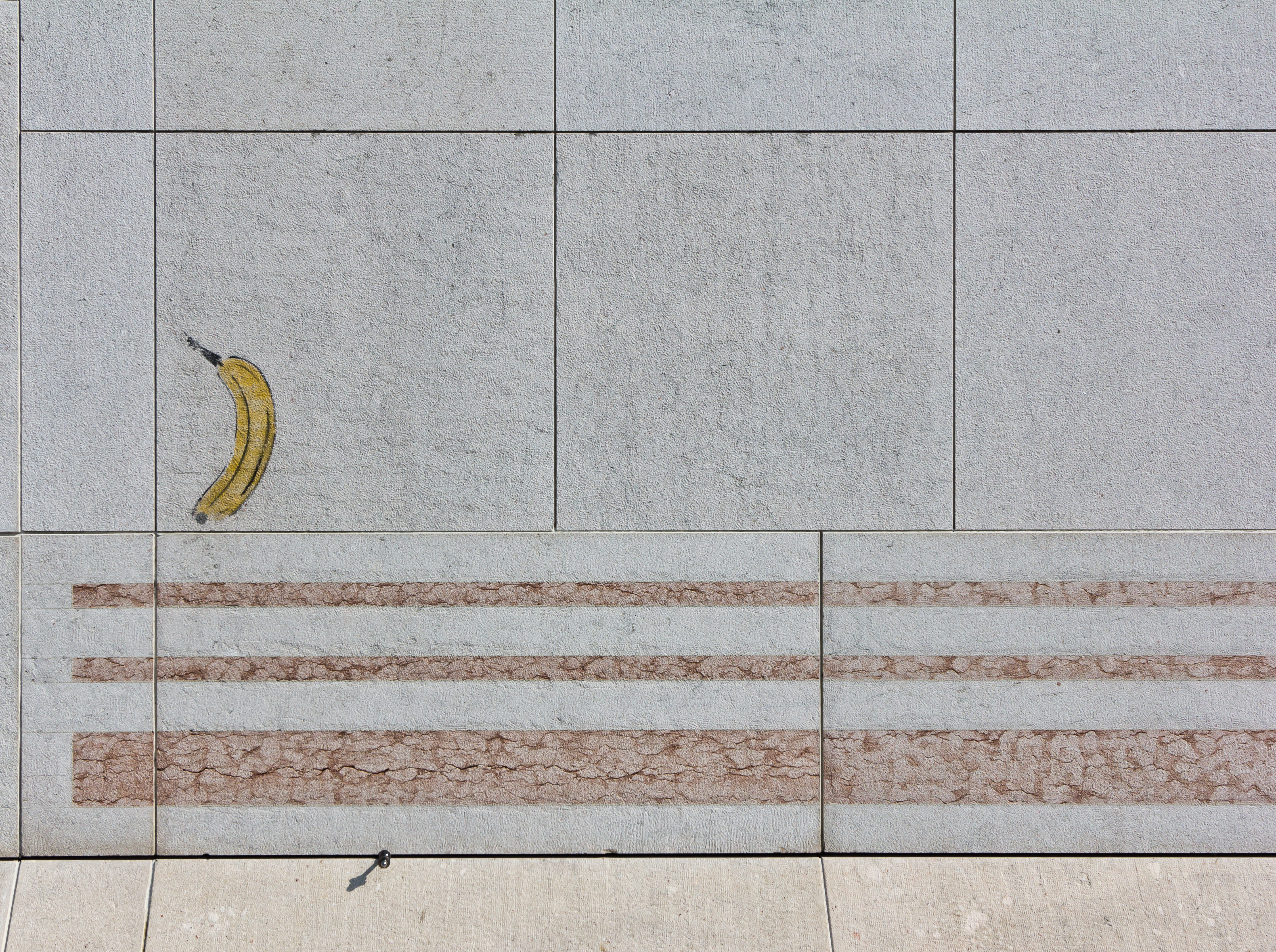 Kunst- und Ausstellungshalle der Bundesrepublik Deutschland - BundeskunsthalleFoto: Eine Spraybanane von Thomas Baumgärtel rechts vom Haupteingang zur Bundestkunsthalle